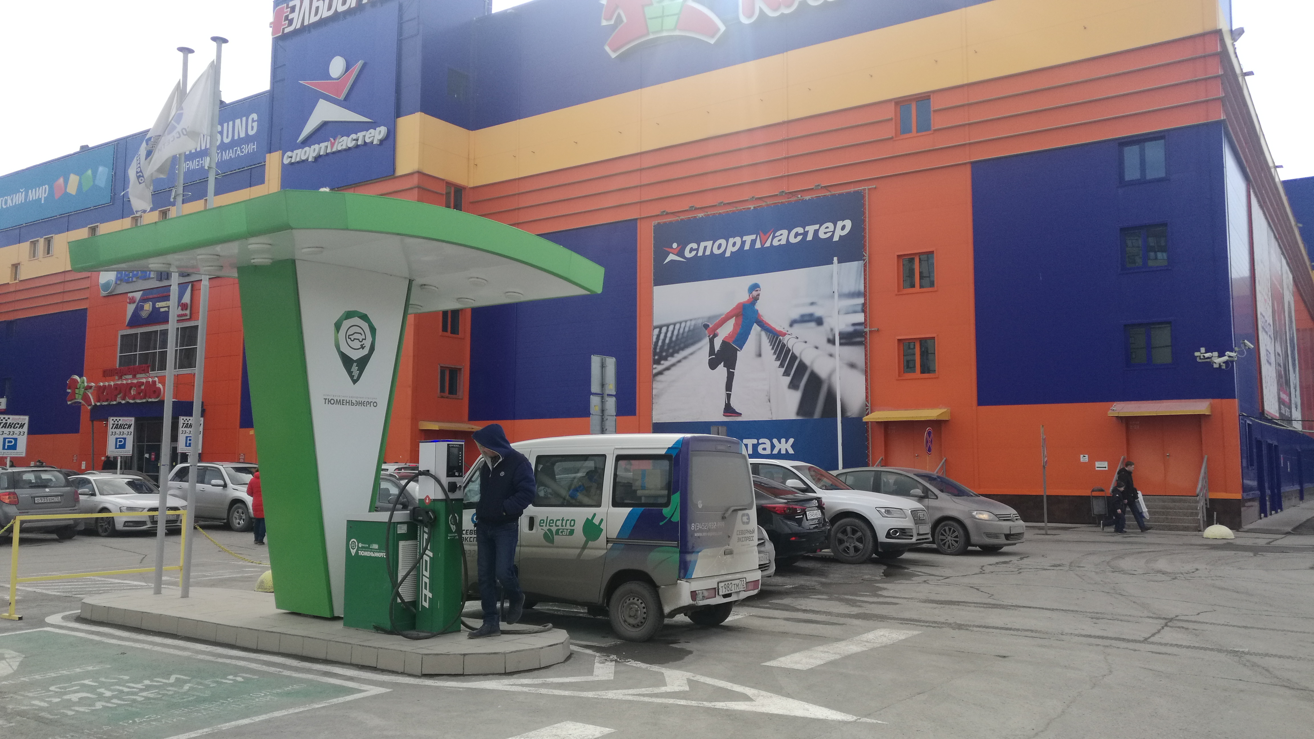 Elektroŝarĝejo apud aĉetcentro Goodwin. Tjumeno, Rusio.